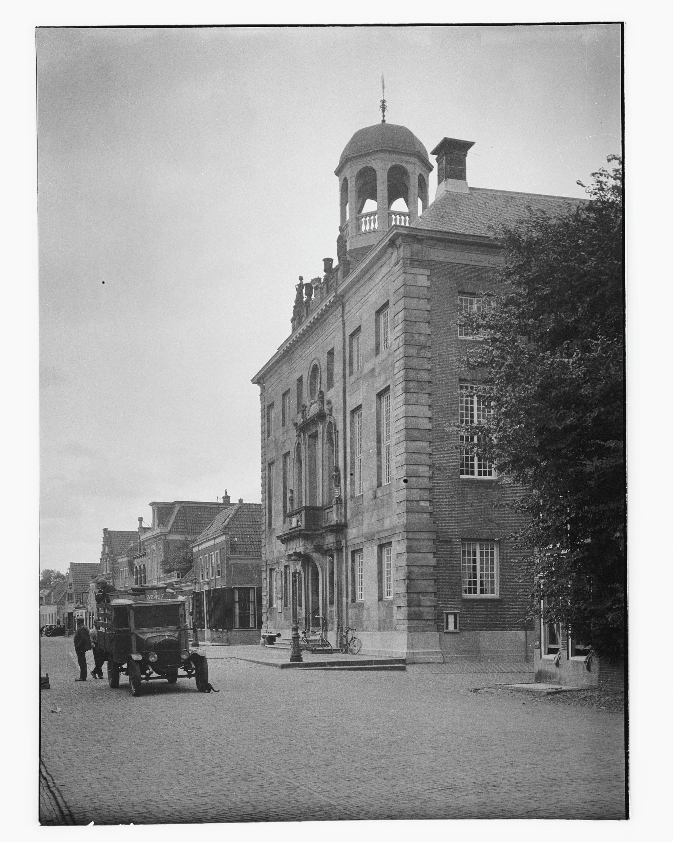 Raadhuis: aanzicht